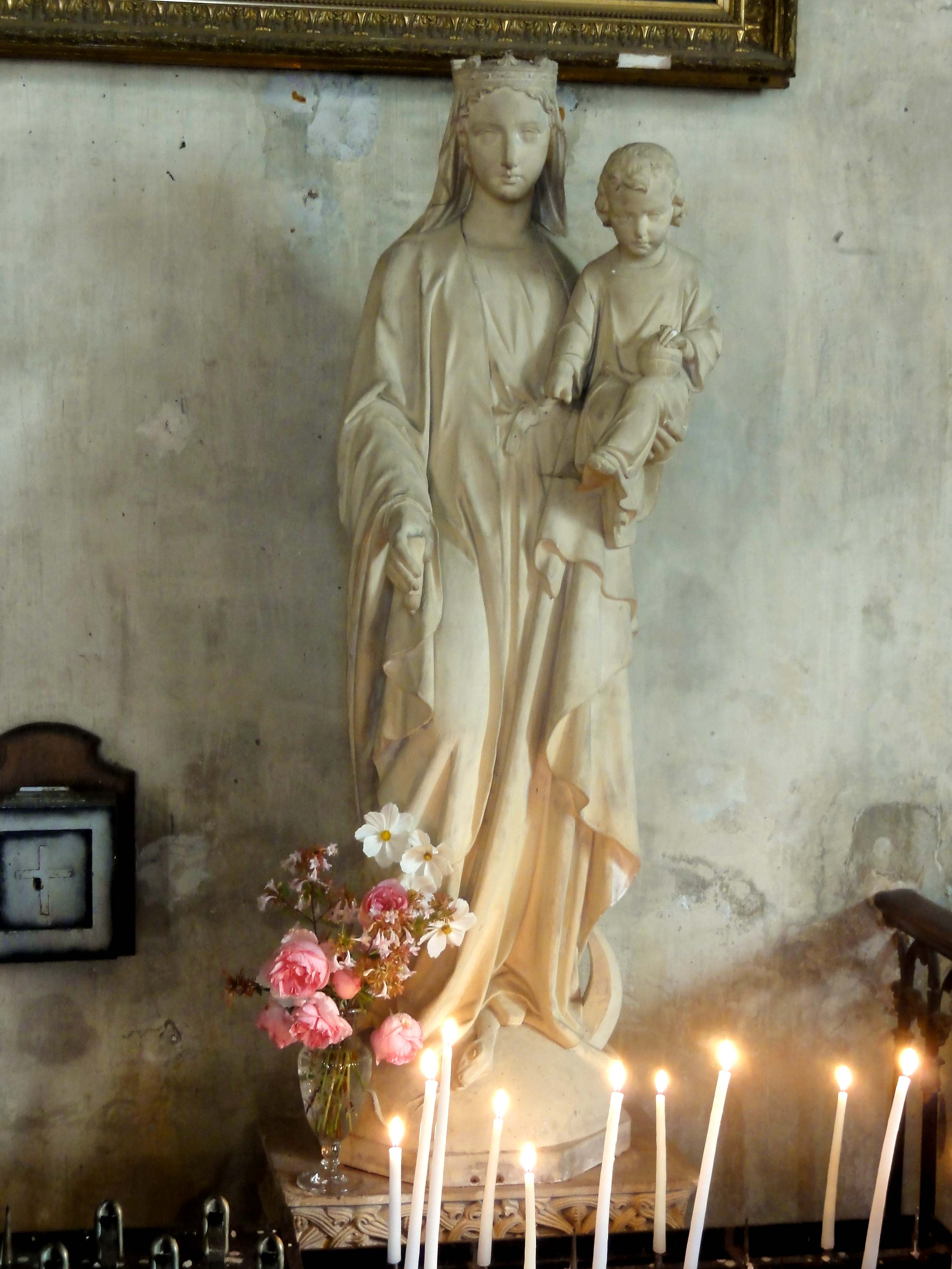 Vierge à l'Enfant (statue sulpicienne, XIXe s.)